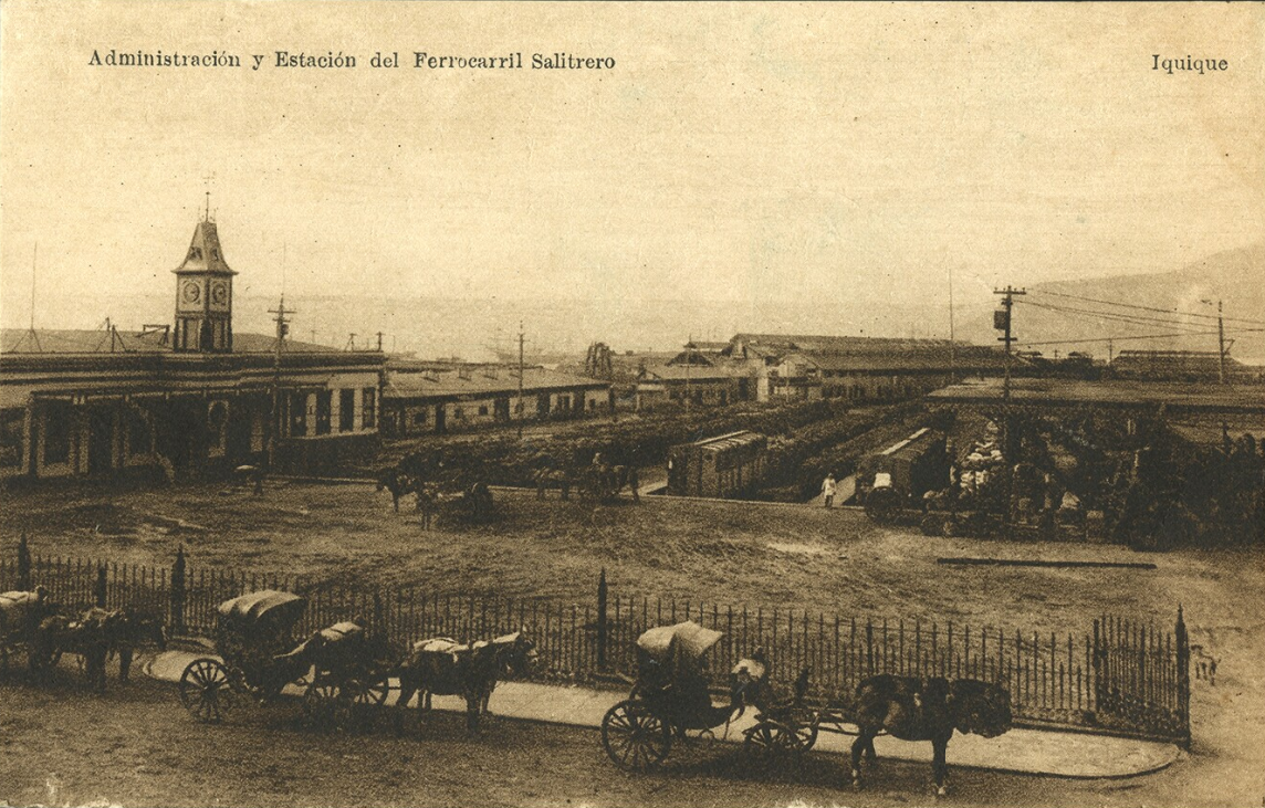 Vista de la Administración y Estación de Ferrocarriles de Iquique, circa 1900.